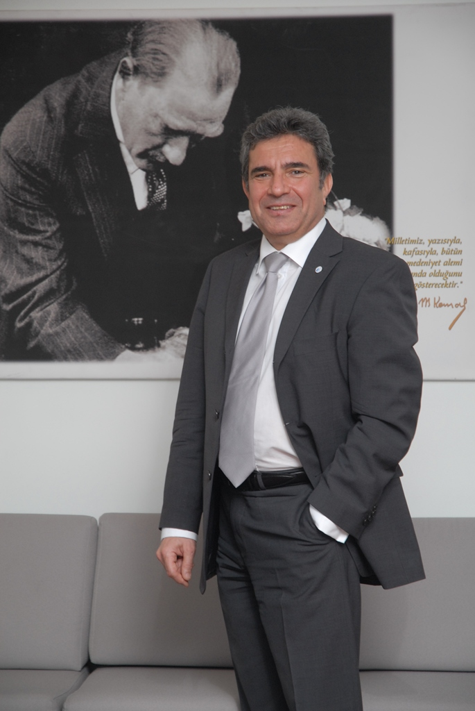 Nuri Otay, Ford Otosan Genel Müdürü